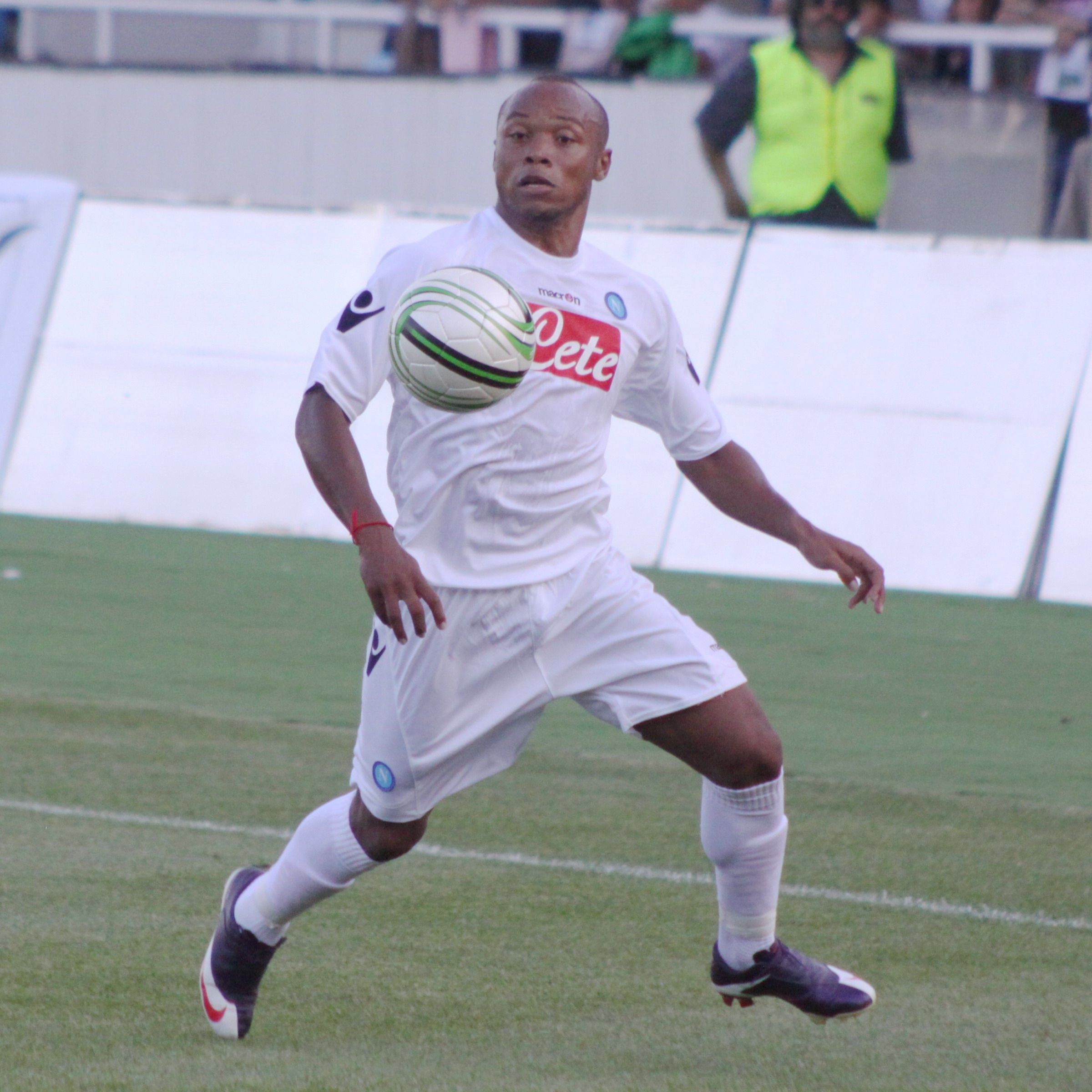 Juan Camilo Zúñiga - SSC Neapel (4) Juan Camilo Zúñiga - Società Sportiva Calcio Napoli